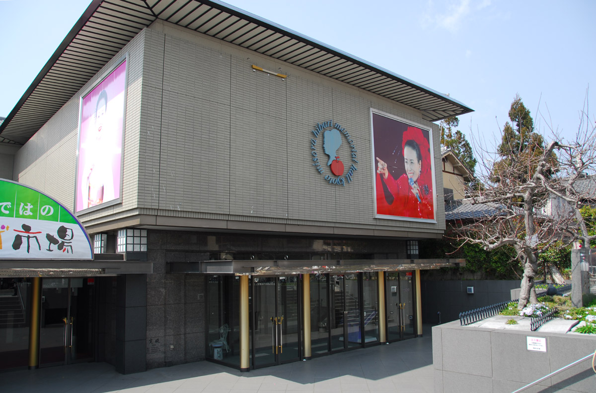 位於京都嵐山的美空雲雀紀念館